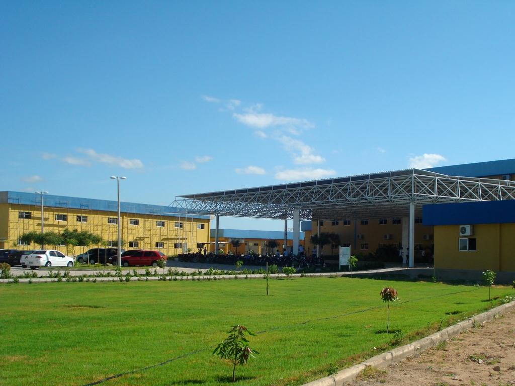 Campus do IFRN em Pau dos Ferros